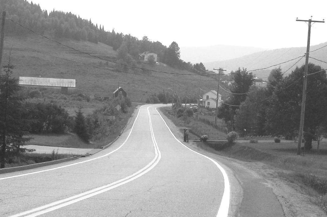 Vue du vieux Tewkesbury (sur la 371 en direction de Shannon) Qc Canada